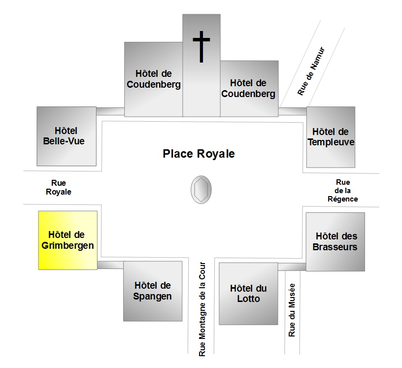 Belgique - Bruxelles - Plan de la place Royale - Hôtel de Grimbergen